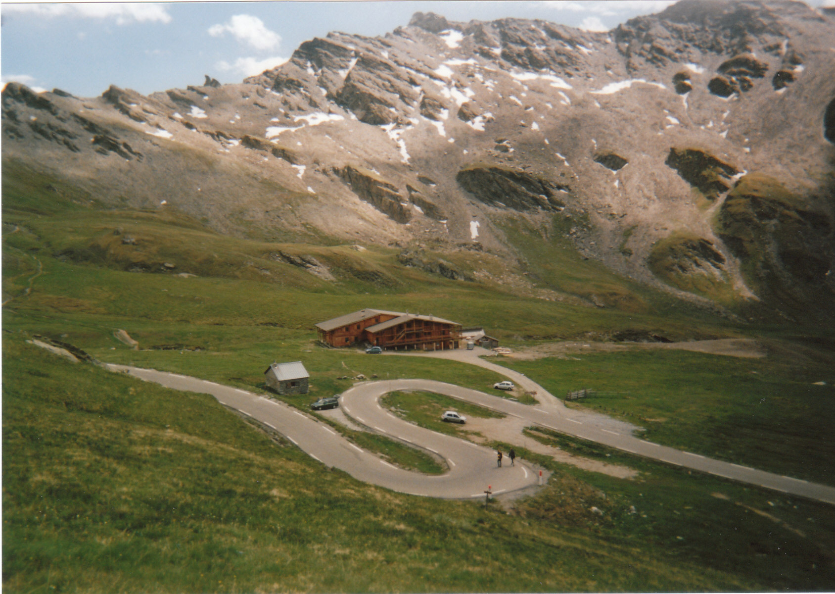 Le refuge Agnel